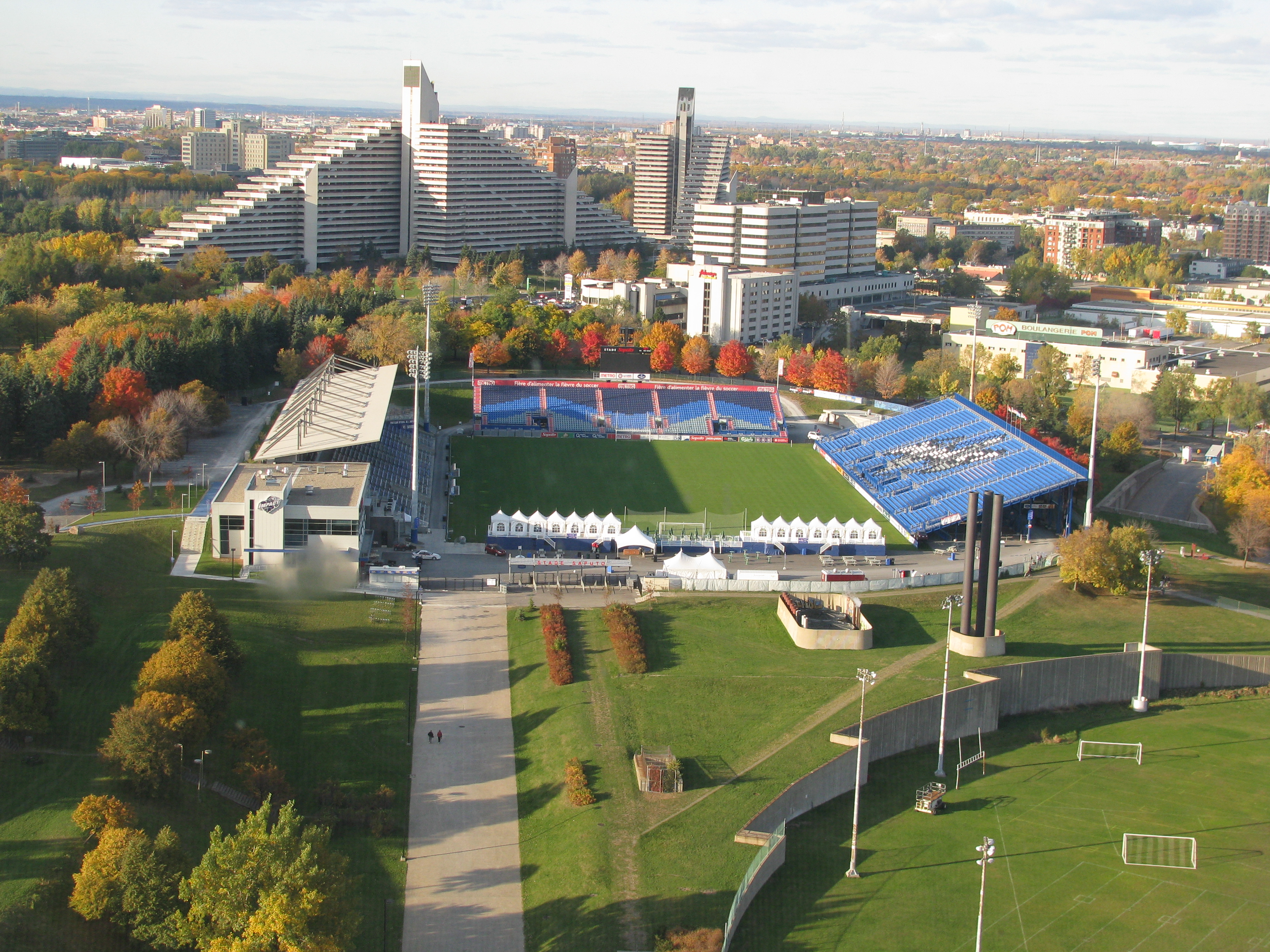 Saputo Stadium